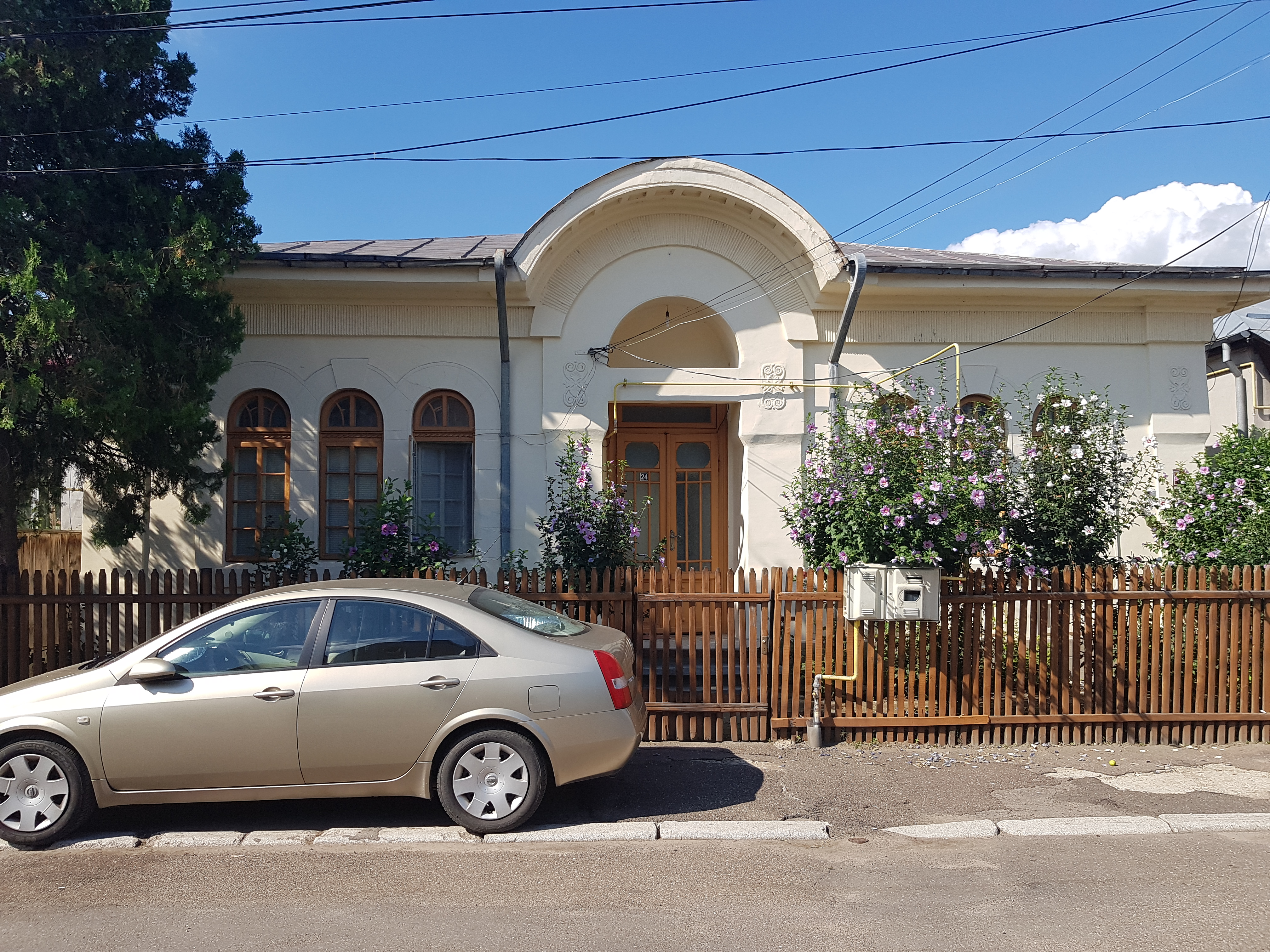 Monument istoric